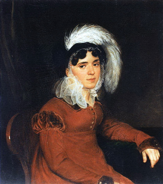 Портрет Кикиной Марии Ардалионовны, ур.Торсуковой